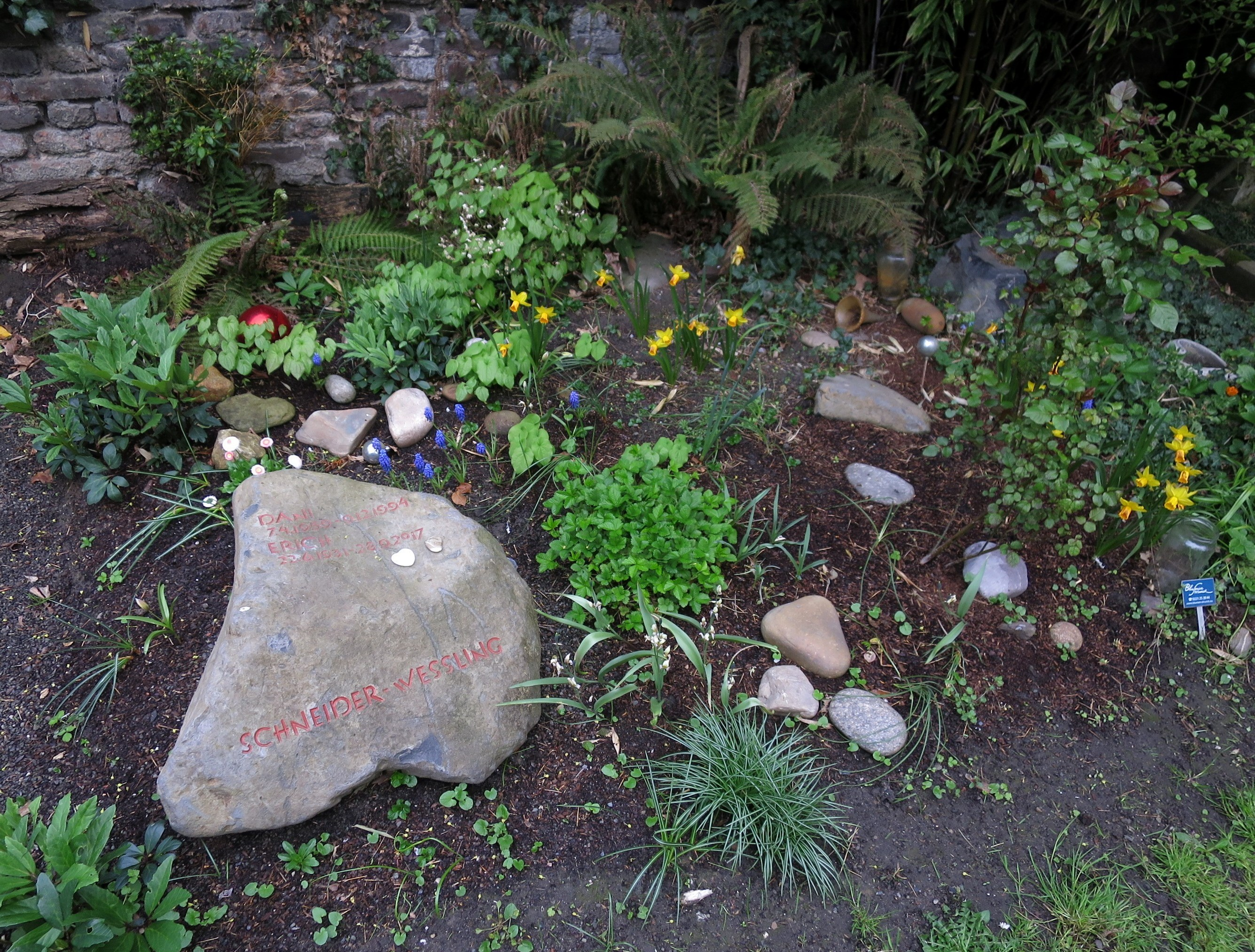 Erich und Dani(ele) Schneider-Wessling - Grab Melaten-Friedhof